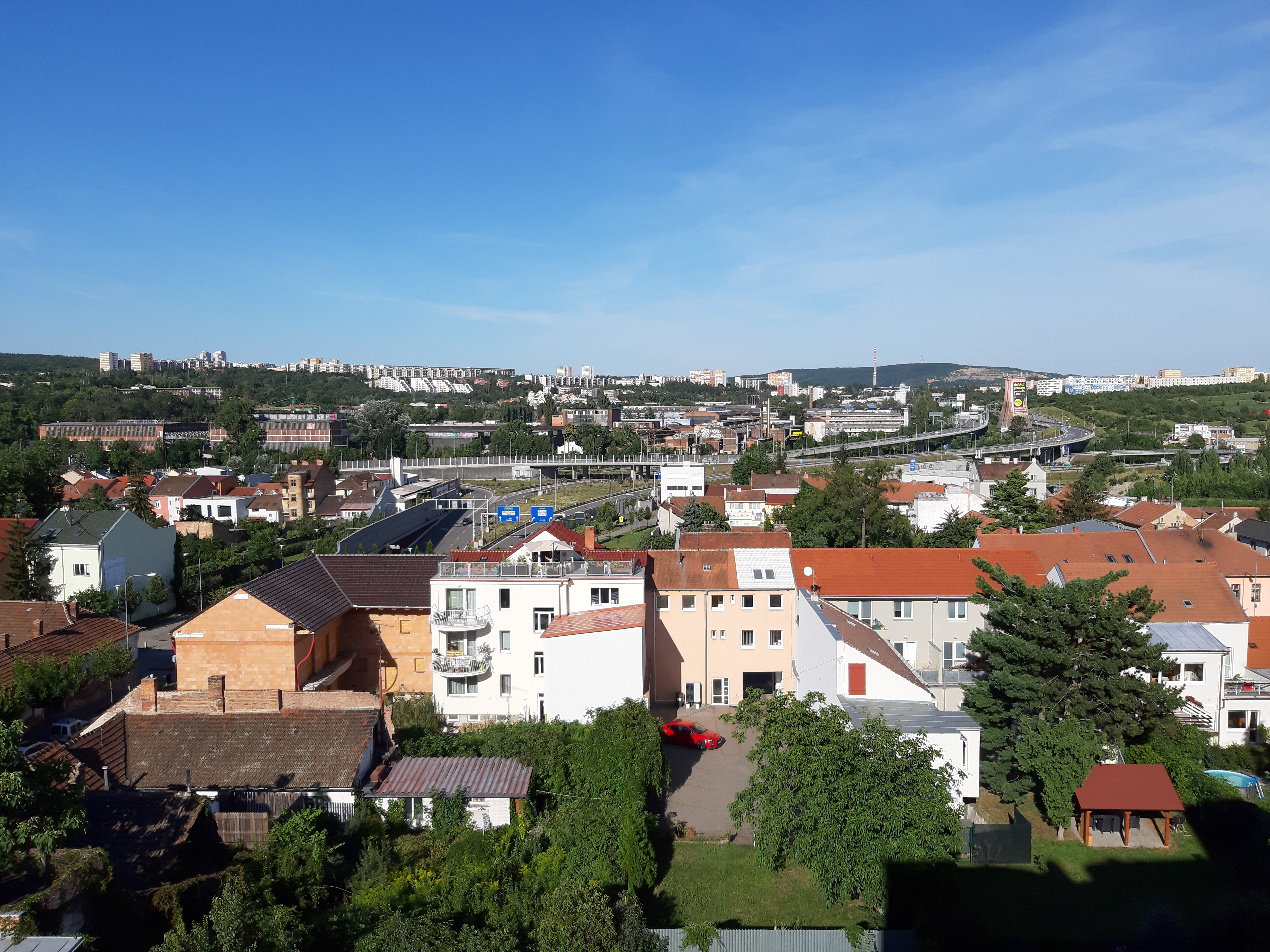 Pohled z okna vilky v Králově poli.